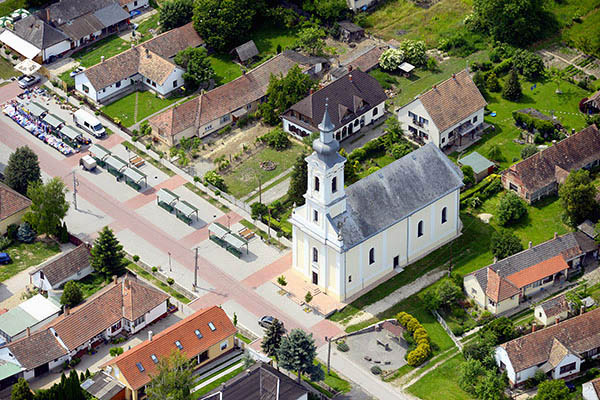 Légi fotó, Ságvár